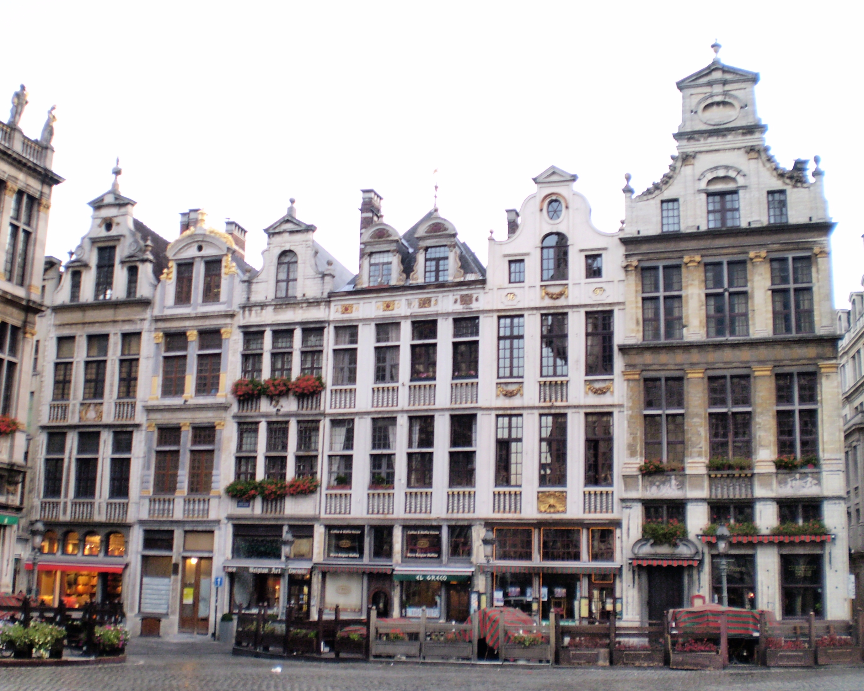 Maisons de la Grand-Place de Bruxelles, entre la rue au Beurre et la rue Chair et Pain (nord-ouest): maison particulière (rue au Beurre), L'Àne, Sainte-Barbe, Le Chêne et Le Samaritain (façade unique), Le Paon, Le Heaume